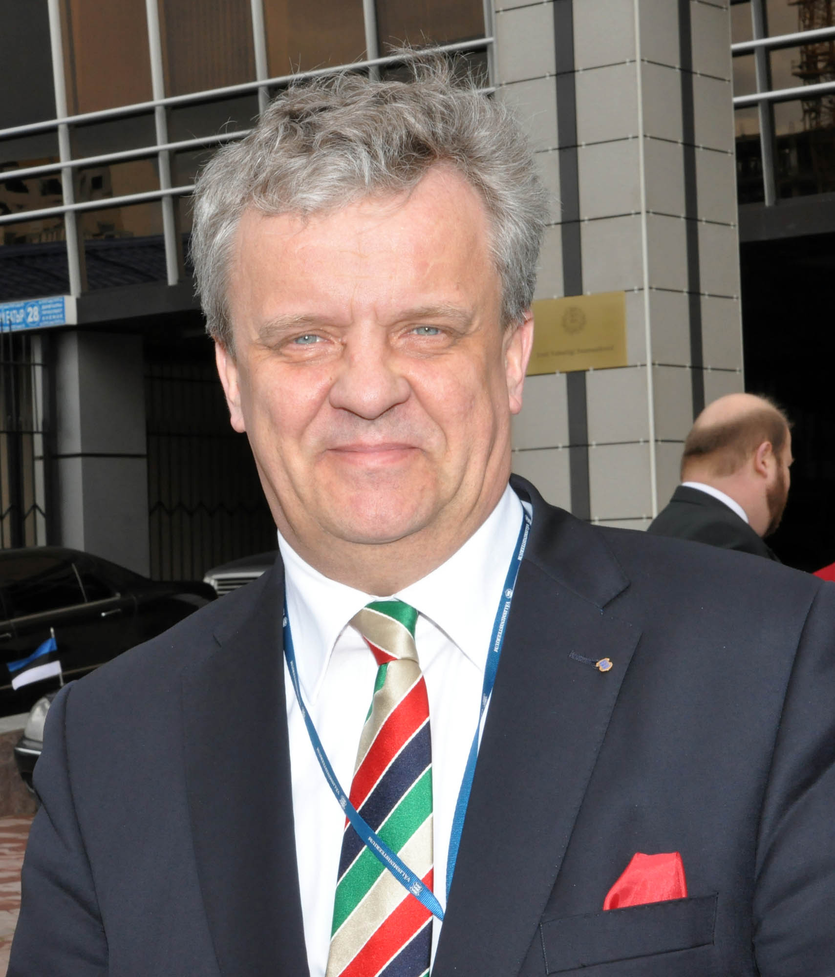 Jaan Hein, Eesti diplomaat